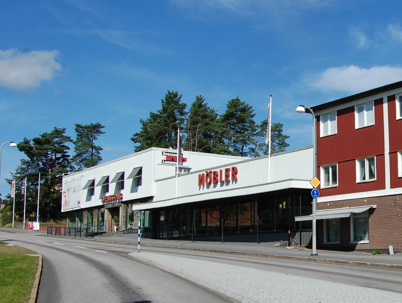 Svenssons Lammhult, Möbelgeschäft in Lammhult